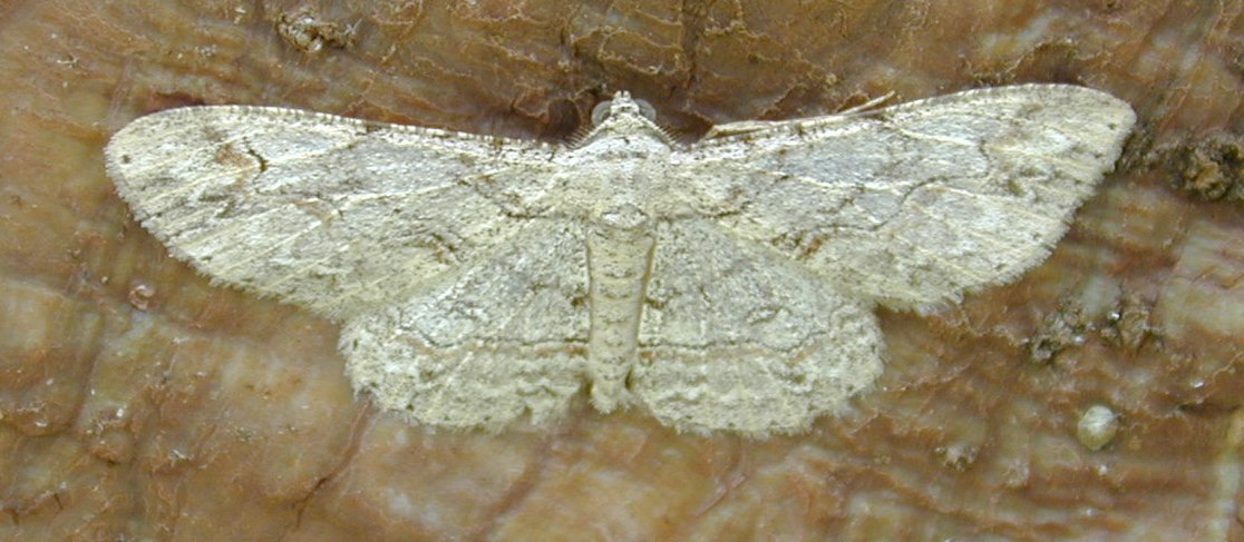 Anacamptodes fragilaria (Geometridae) from Hawai'i, light form